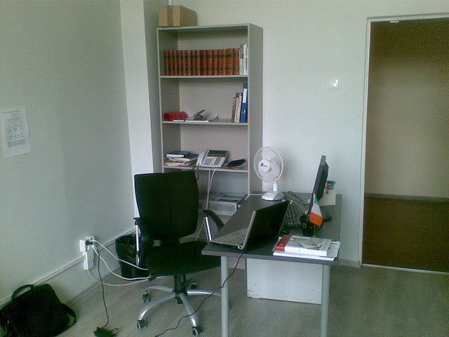 Ametniku töölaud.